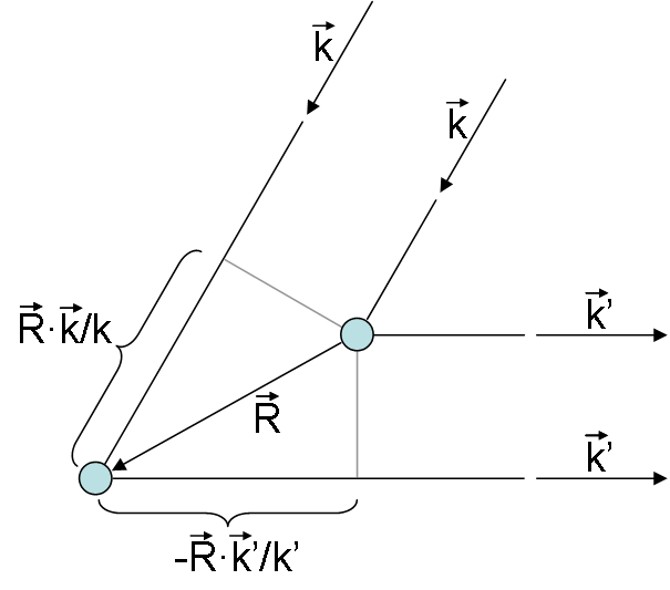 zur Herleitung der Laue-Bedingung: Streuung an einzelnen mikroskopischen Objekten, deren Abstand ein Gittervektor R ist. k sei der Wellenvektor der einfallenden Welle und k' der der gestreuten Welle.